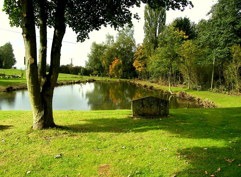 Reste der ehem. Wasserburg mit alten Wappenstein